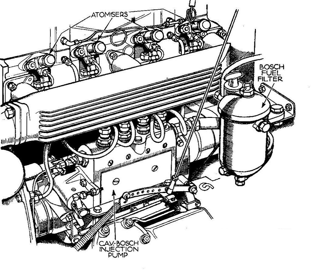 Perkins diesel car engine (Autocar Handbook, 13th ed, 1935).jpg